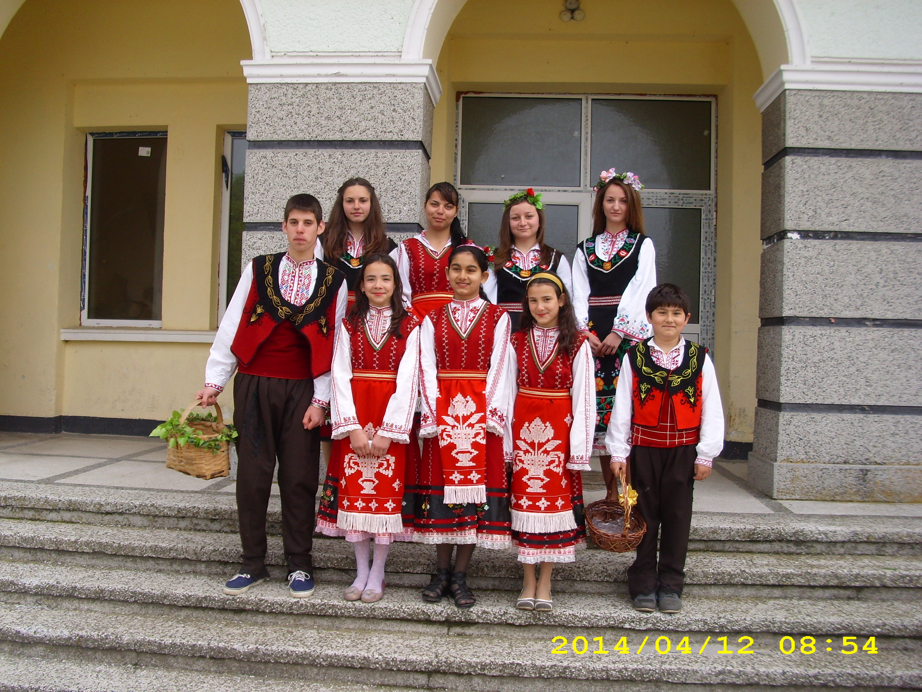 лазарки към НЧ,,Деско Кръстев 1902